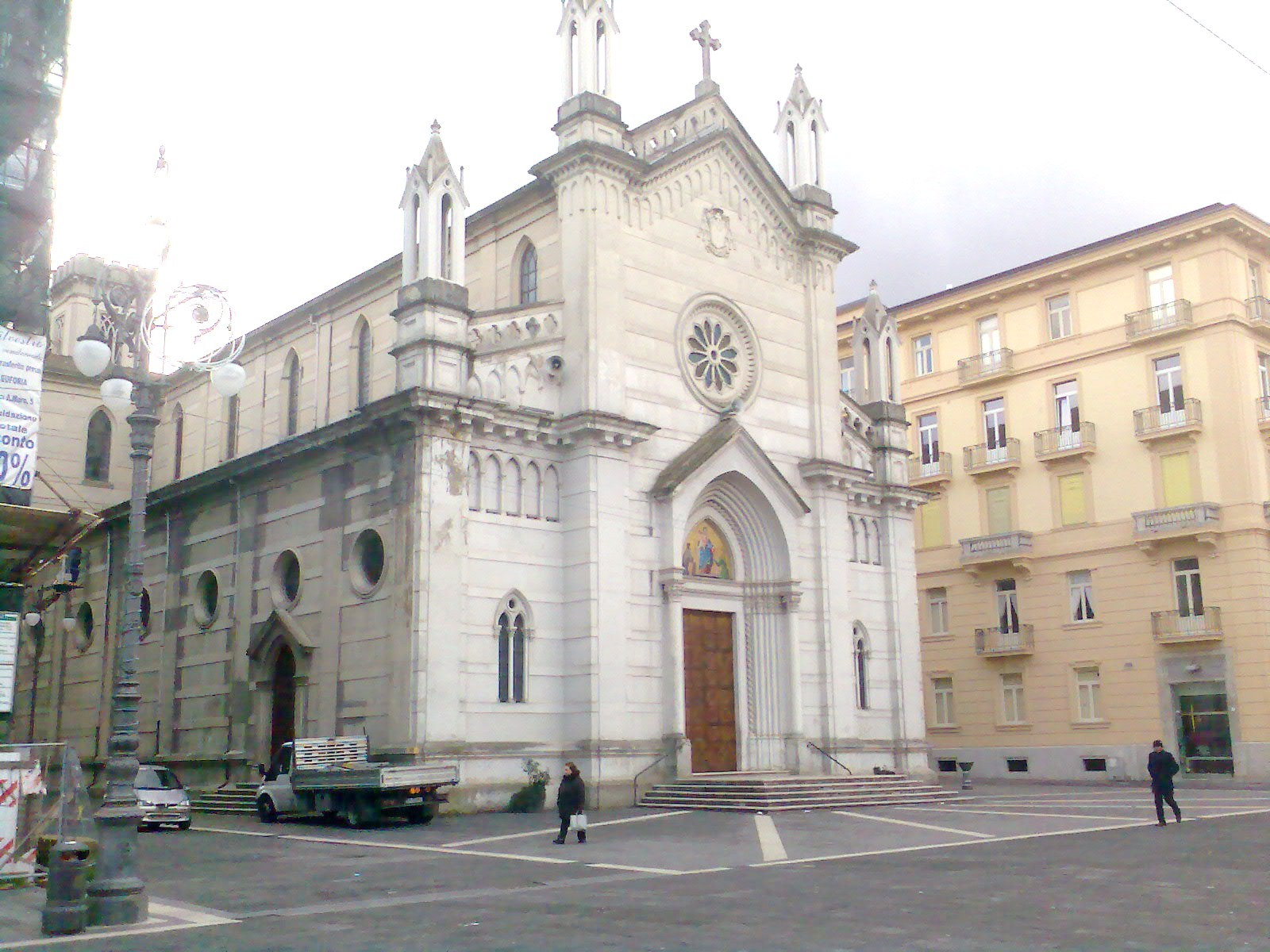 Chiesa del Santo Rosario